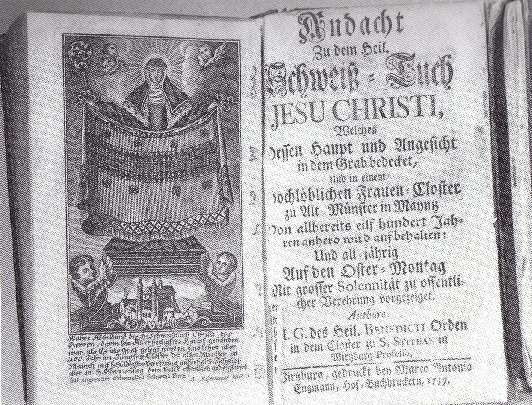 Andacht zu dem Heil. Schweiß-Tuch Jesus Christus. Geistliche Andachtsübungen von der Heil Bilhildis. In: 1300 Jahre Altmünsterkloster in Mainz : Abhandlungen und Ausstellungskatalog ; Ausstellung im Landesmuseum Mainz vom 28. November 1993 bis 27. Februar 1994 / hrsg. im Auftr. des Landesmuseums Mainz ... von Ingrid Adam und Horst Reber. Mit Beitr. von I. Adam. Mainz : Landesmuseum, 1993